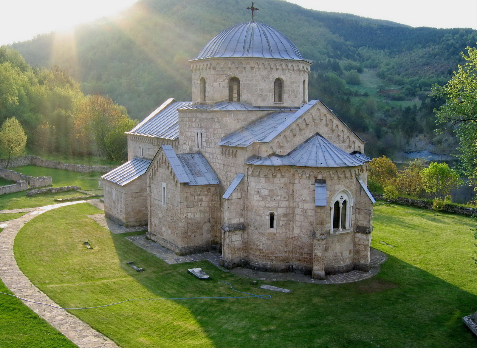 Srednjevekovni srpki manastir, zadužbina kraljice Jelrene Anžujske